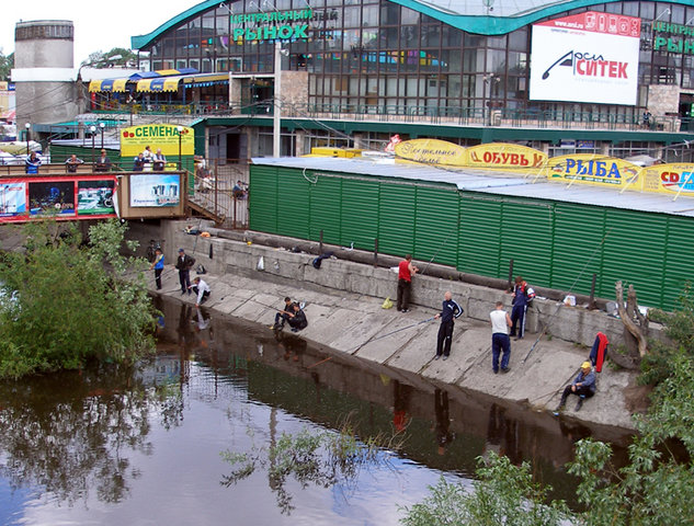 Barnaulka river